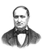 "Antoine (fils de Lucien, Prince de Canino)".